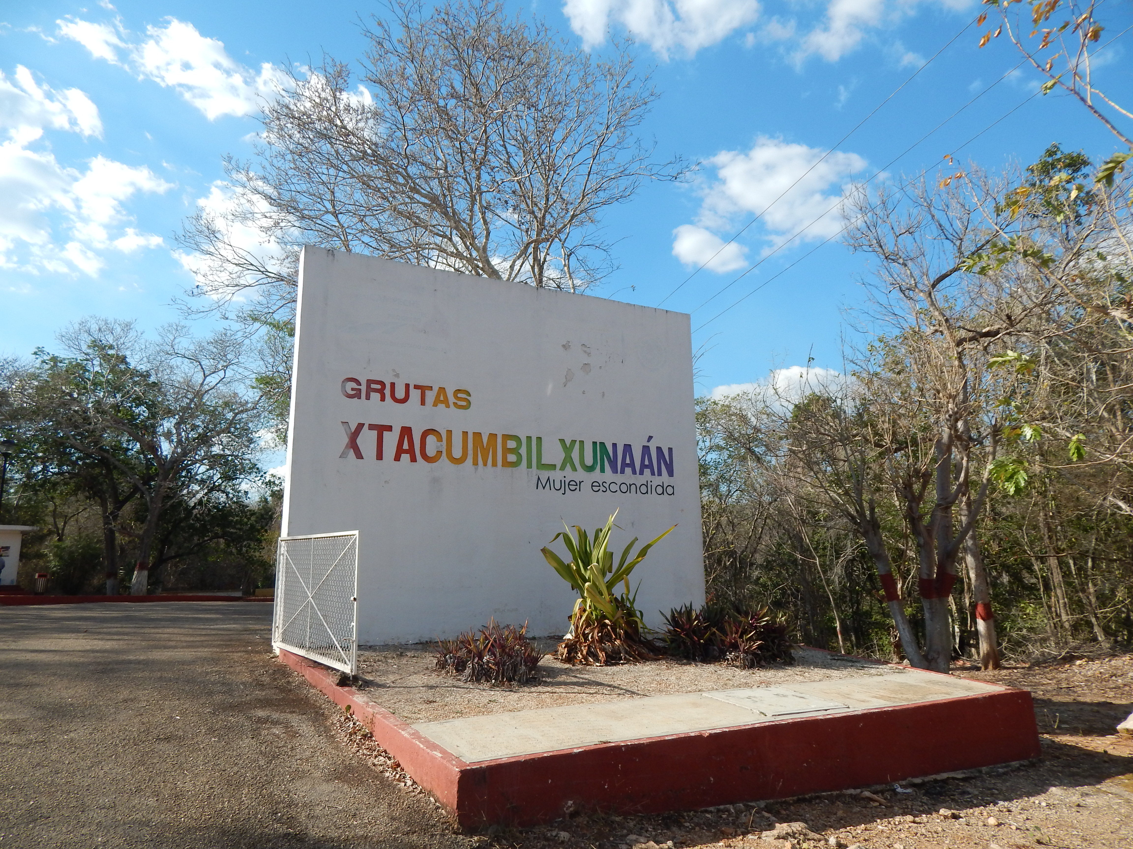 Letrero que da a la entrada de las grutas